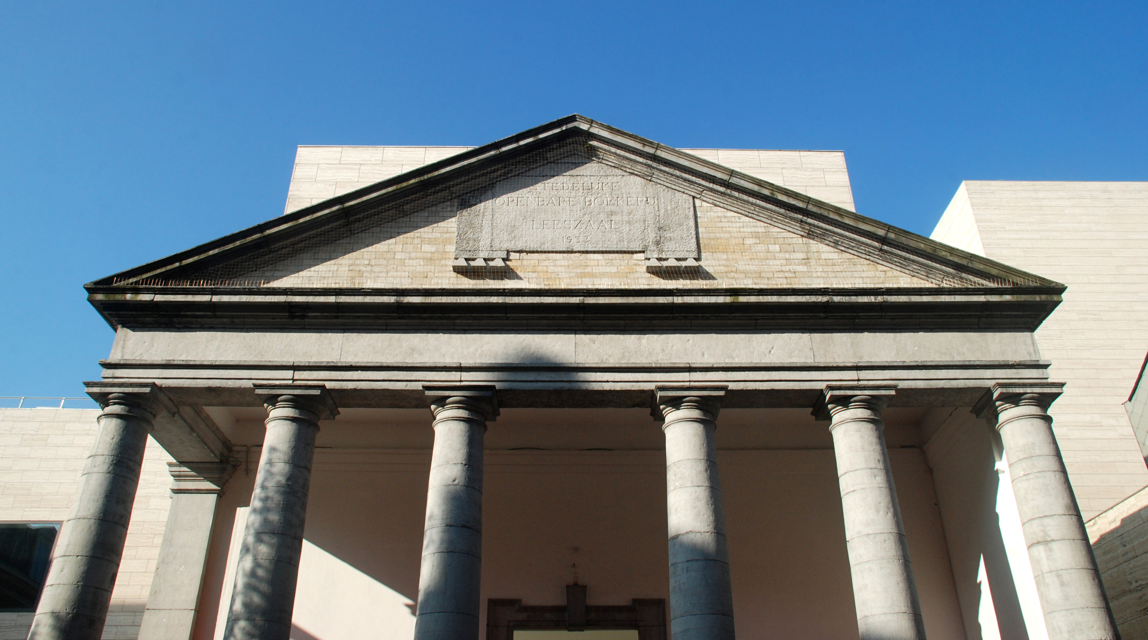 Belgique - Brabant flamand - Louvain - portail néo-classique Vicus Artium